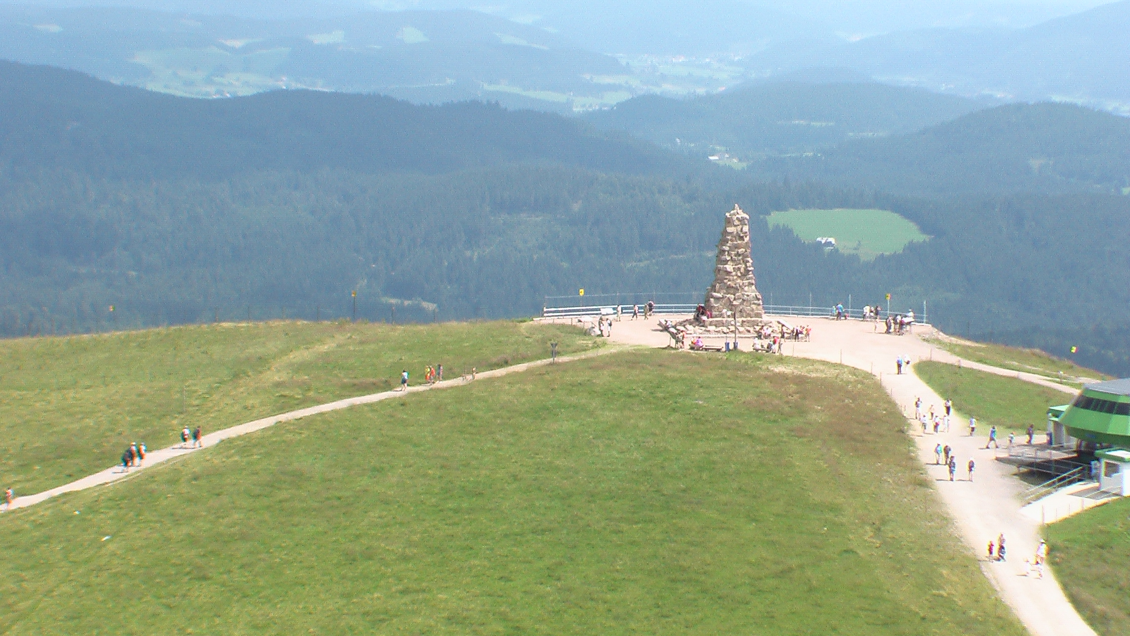 Der Gipfel des Seebuck mit Bismarckdenkmal und der Bergstation der Sesselbahn, dahinter Ramselegut